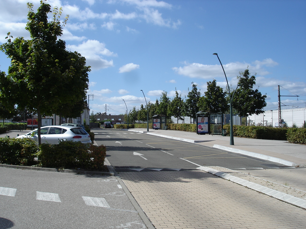 Les Essarts-le-Roi (78) : La rue de la Cité.